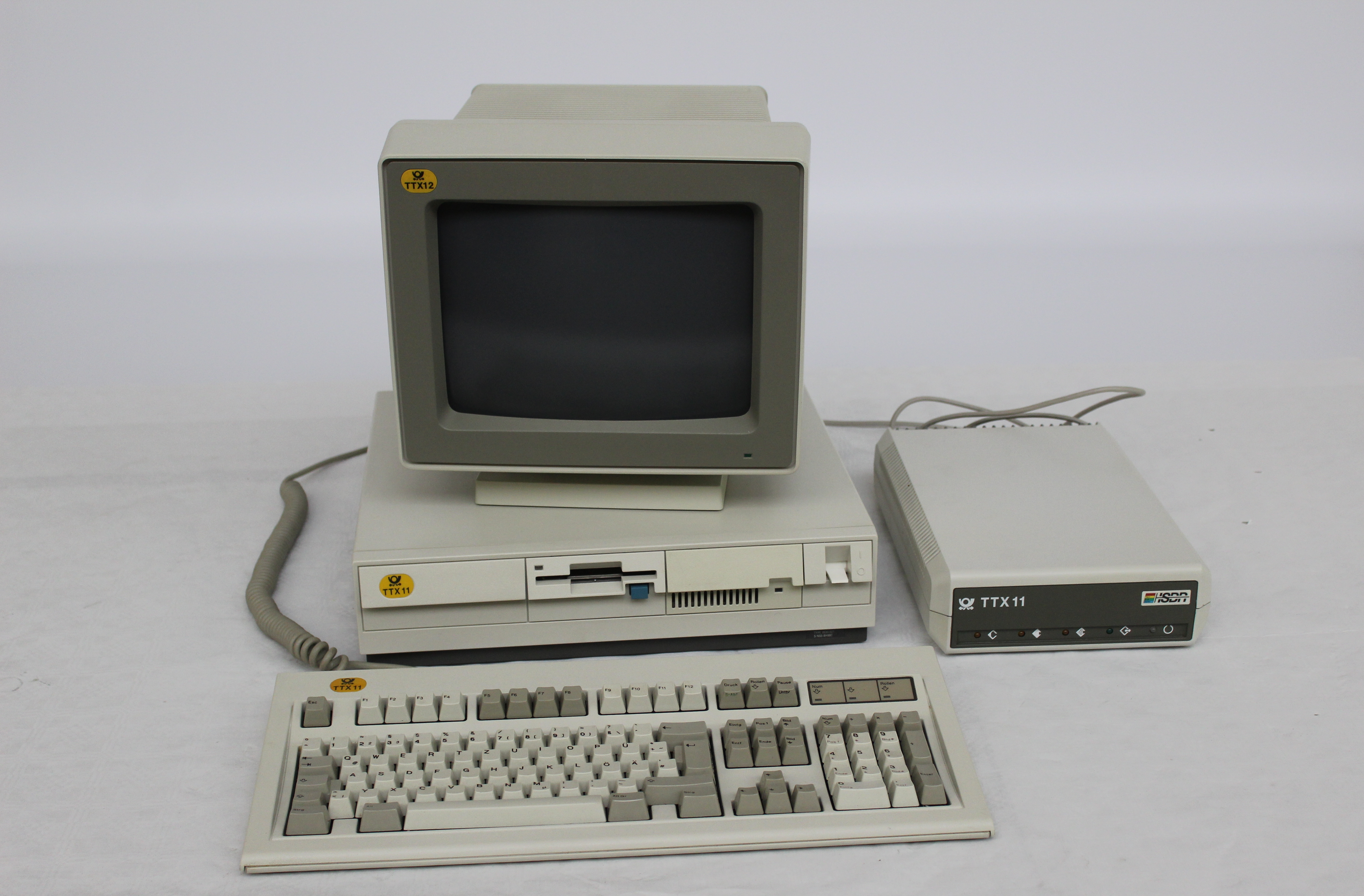 TTX11 Teletex-Endgerät mit Terminaladapter TTX11 Aufgenommen im ehemaligen Fernmeldezentralzeugamt Elmshorn The making of this document was supported by the Community-Budget of Wikimedia Germany.